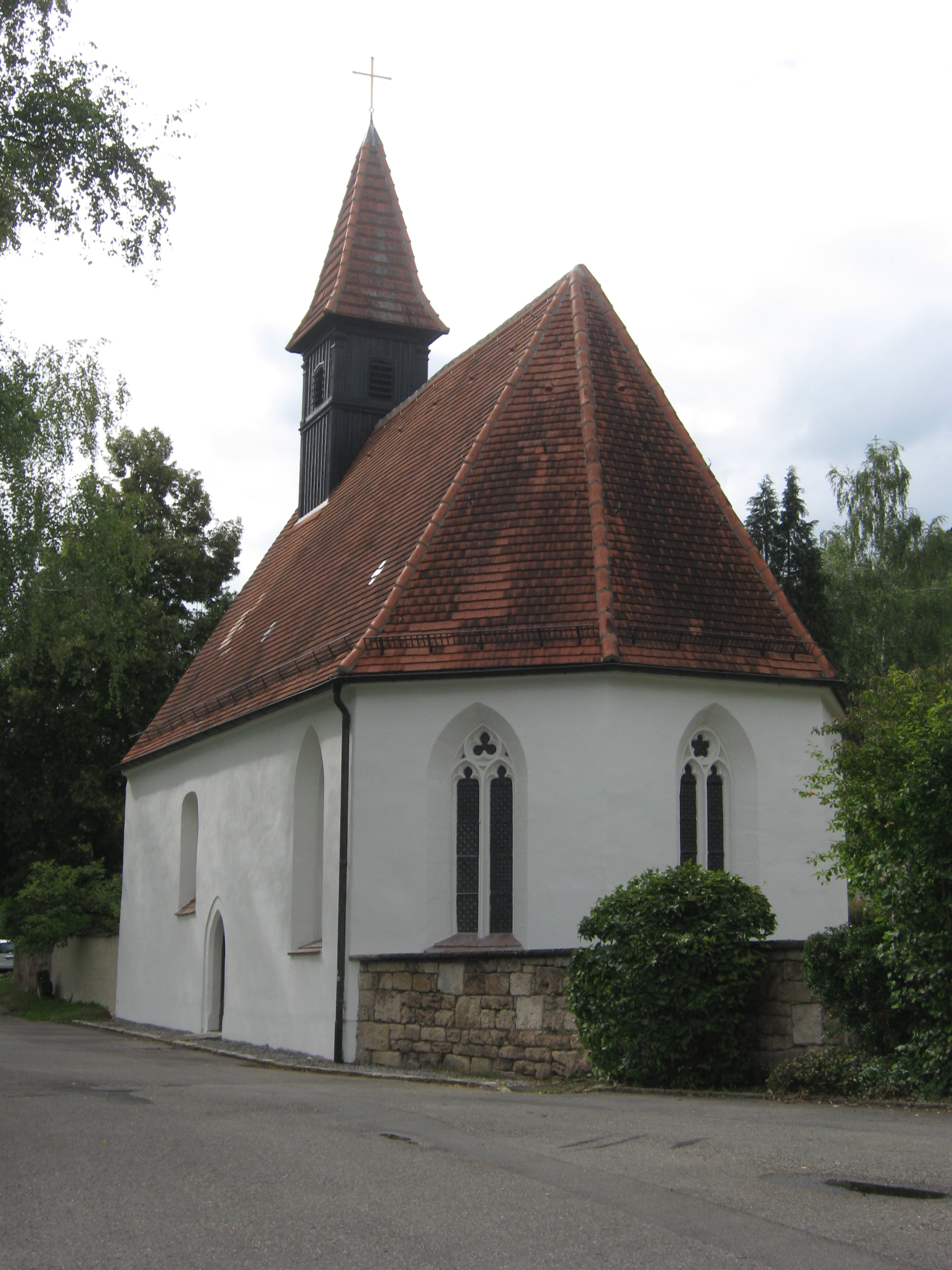 Die Wallfahrtskapelle Zu unserer lieben Frau beim Holderbusch und St. Urban wurde 1396 in Hirschau bei Tübingen erbaut. Bei der Kapelle wurde 1852 ein neuer Friedhof angelegt.